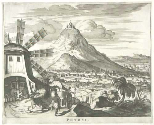 Es un grabado del siglo XVIII hecho por P. Vander